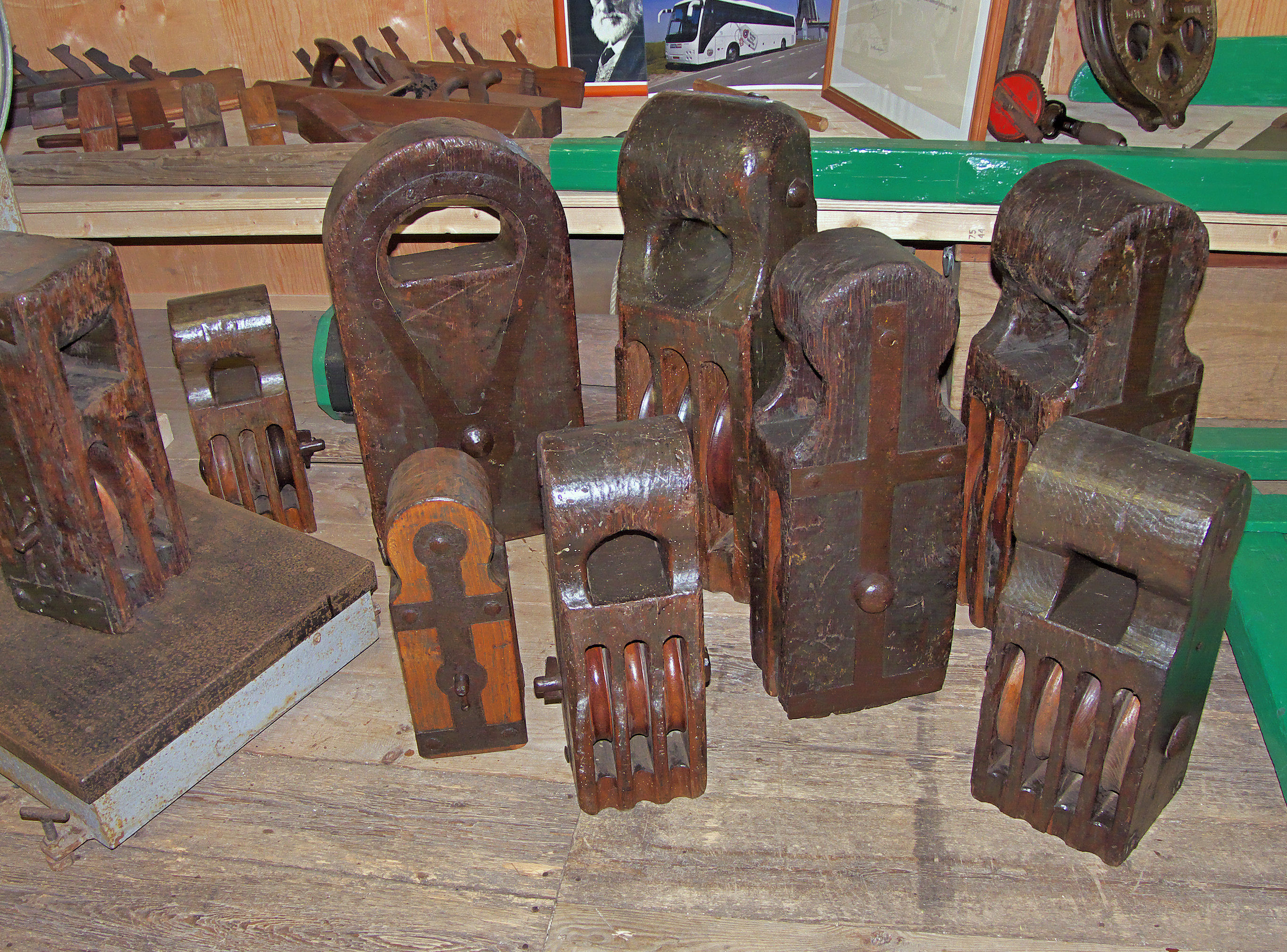 Molen De Liefde, Streefkerk, takel- of jijnblokken